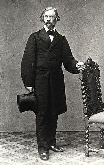 Portrait-Photographie des deutschen Malers Theodor Hildebrandt (1804-1874)